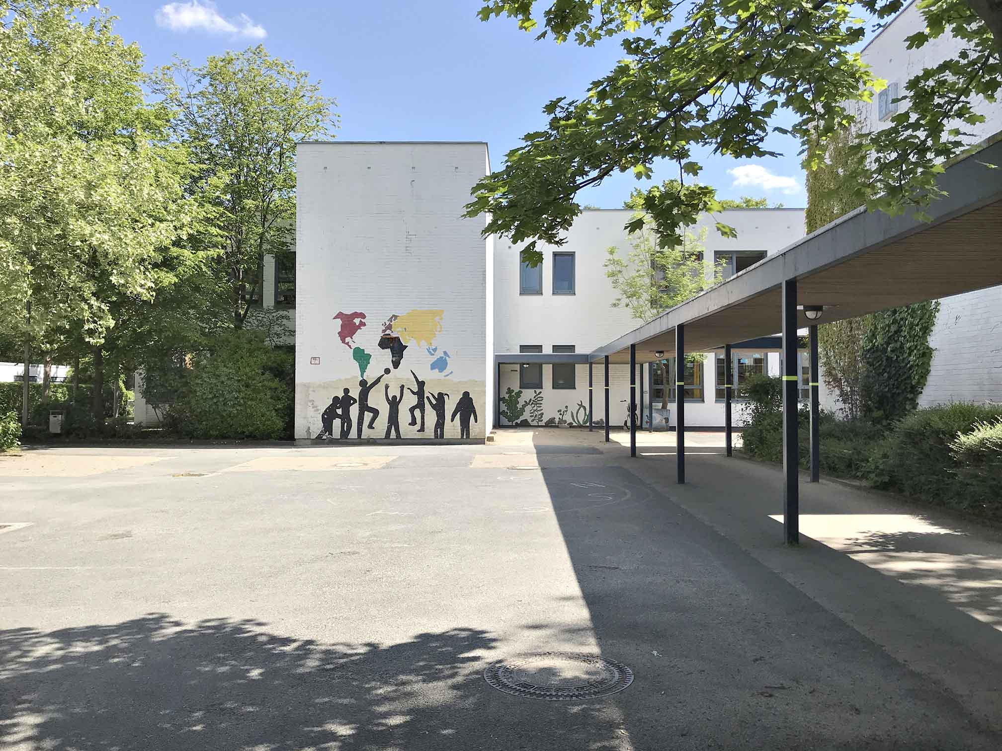 Die Primus Schule in Berg Fidel